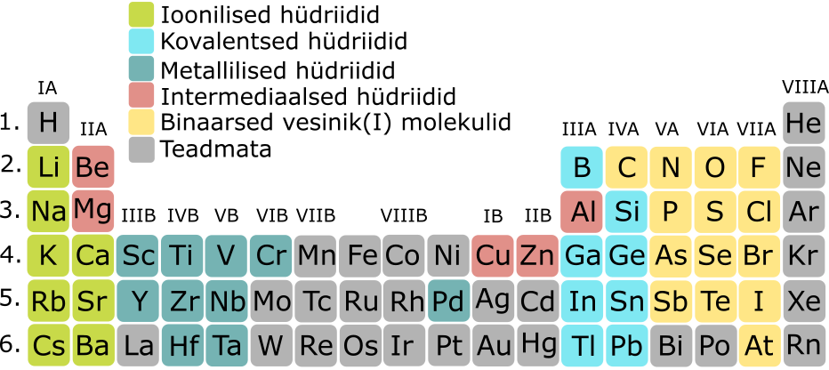 Hüdriidide jaotus perioodilisuse tabelis